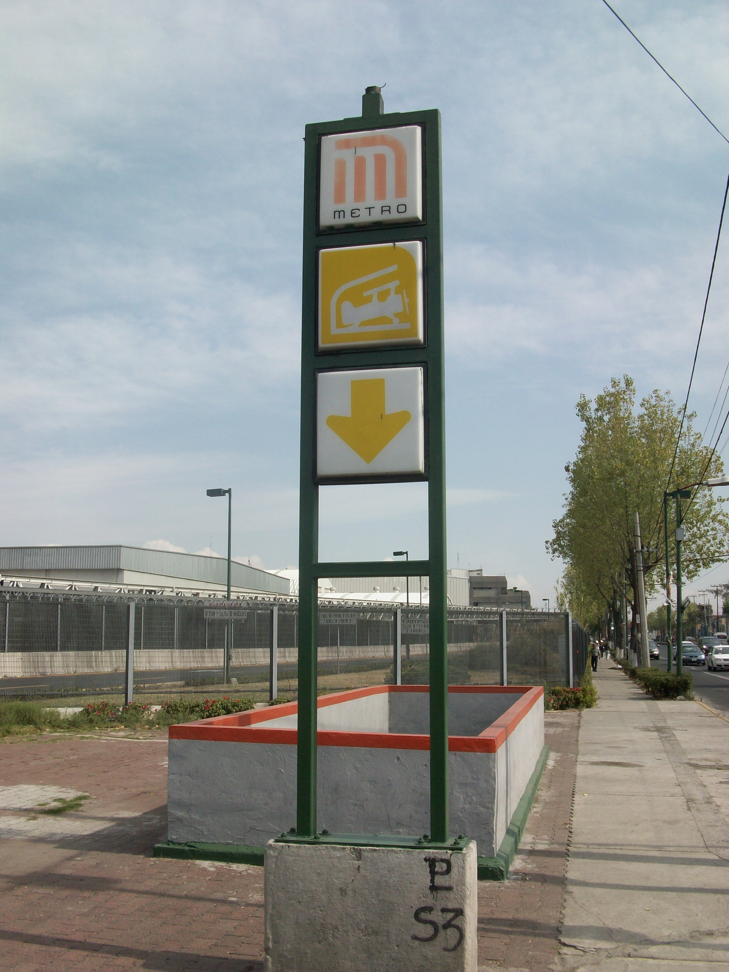 Estela de la estacion Hangares